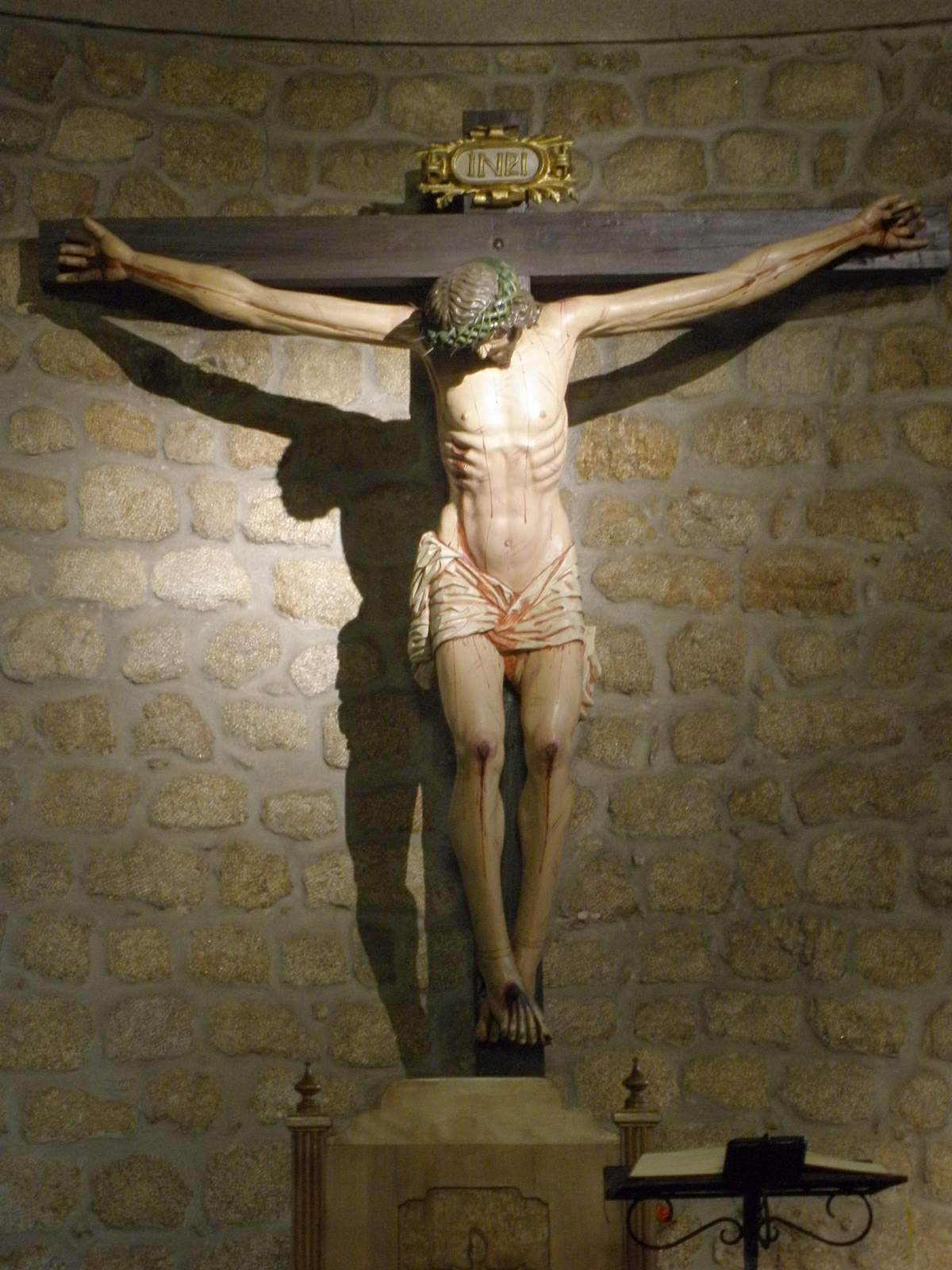 Plasencia - Iglesia de Santiago (Cristo de las Batallas)